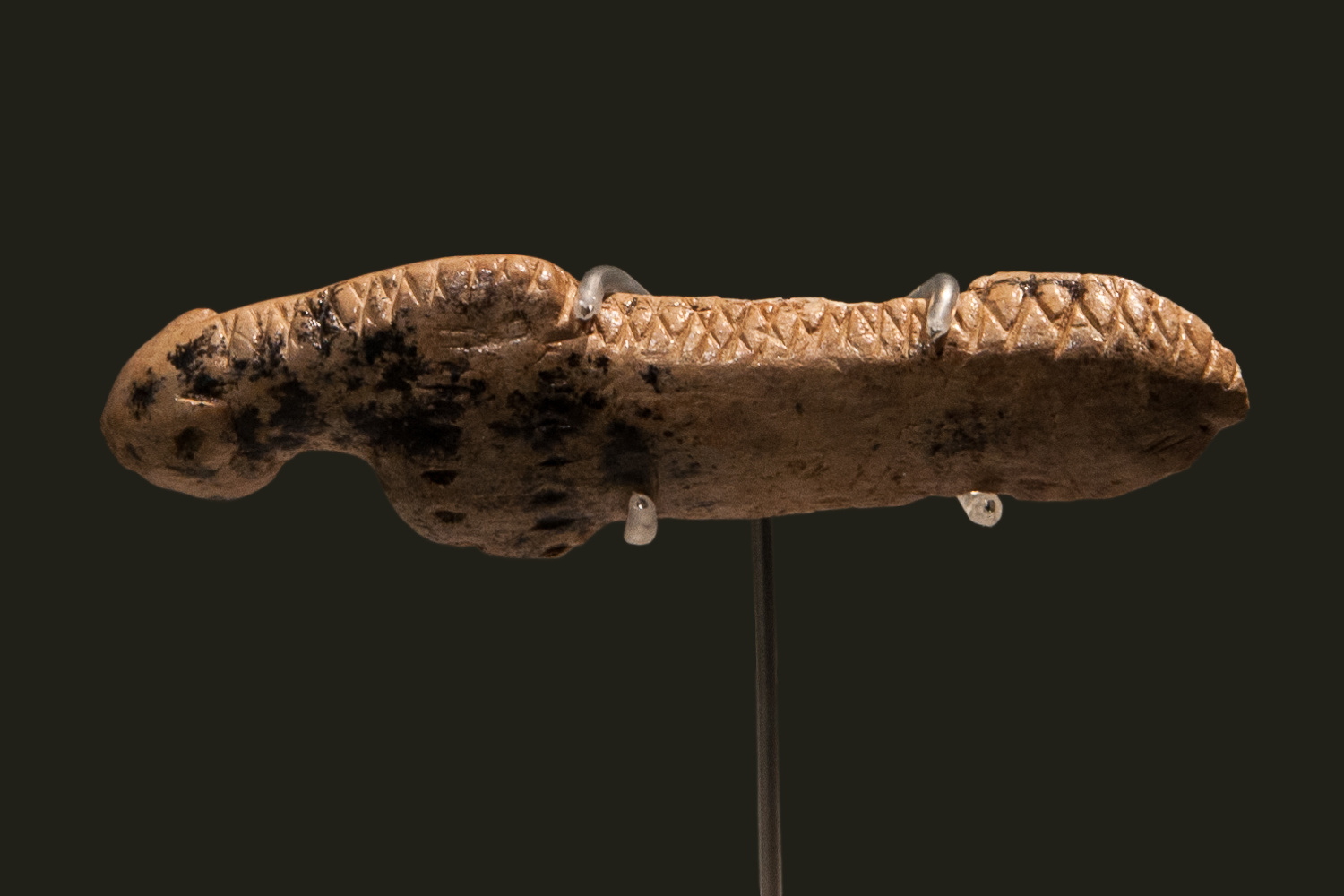 Vogelherdhöhle: Figur eines Höhlenlöwen aus Mammutelfenbein, Fund 2006 im Abraum der Grabung Gustav Rieks von 1931. Aurignacien, Länge 56 mm, Höhe 16 mm, Tiefe 6 mm, Gewicht 3,2 g.